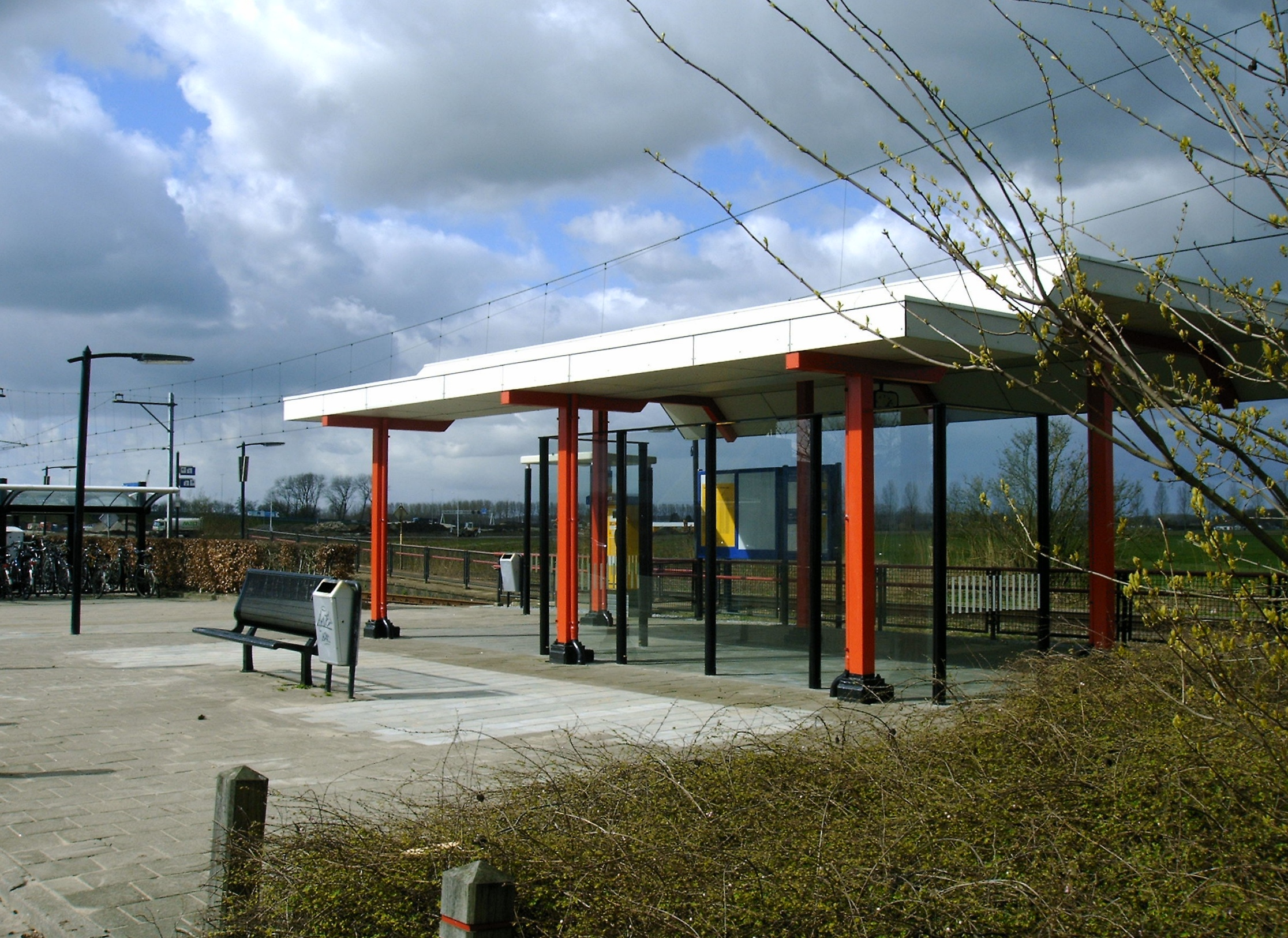 Station Beesd, MerwedeLingeLijn